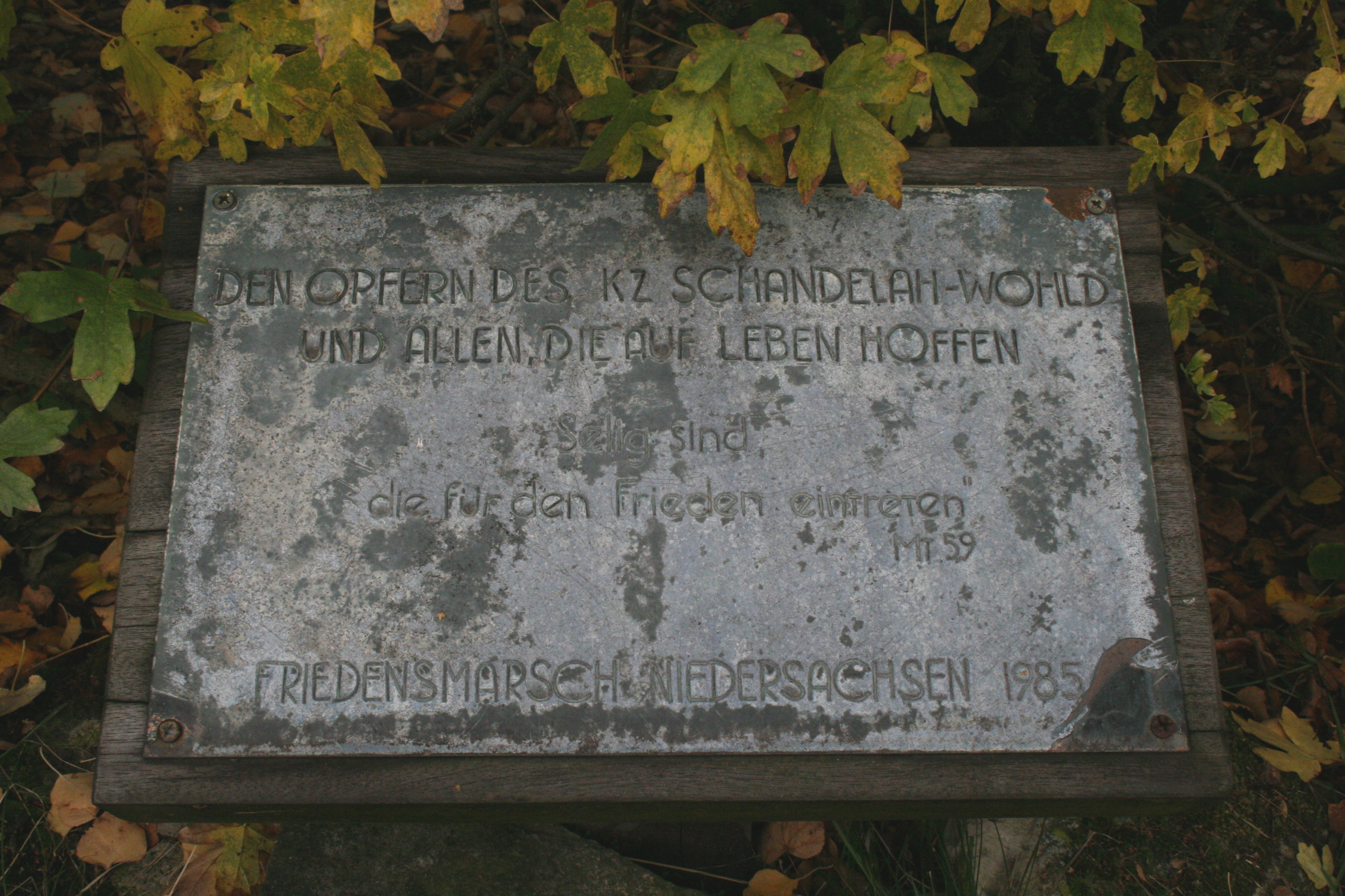 KZ Schandelah, Holzkreuz auf dem Friedhof Scheppau